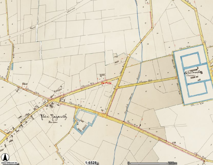 De Pinte, toen nog Klein Nazareth gegeten, op de Atlas van Buurtwegen